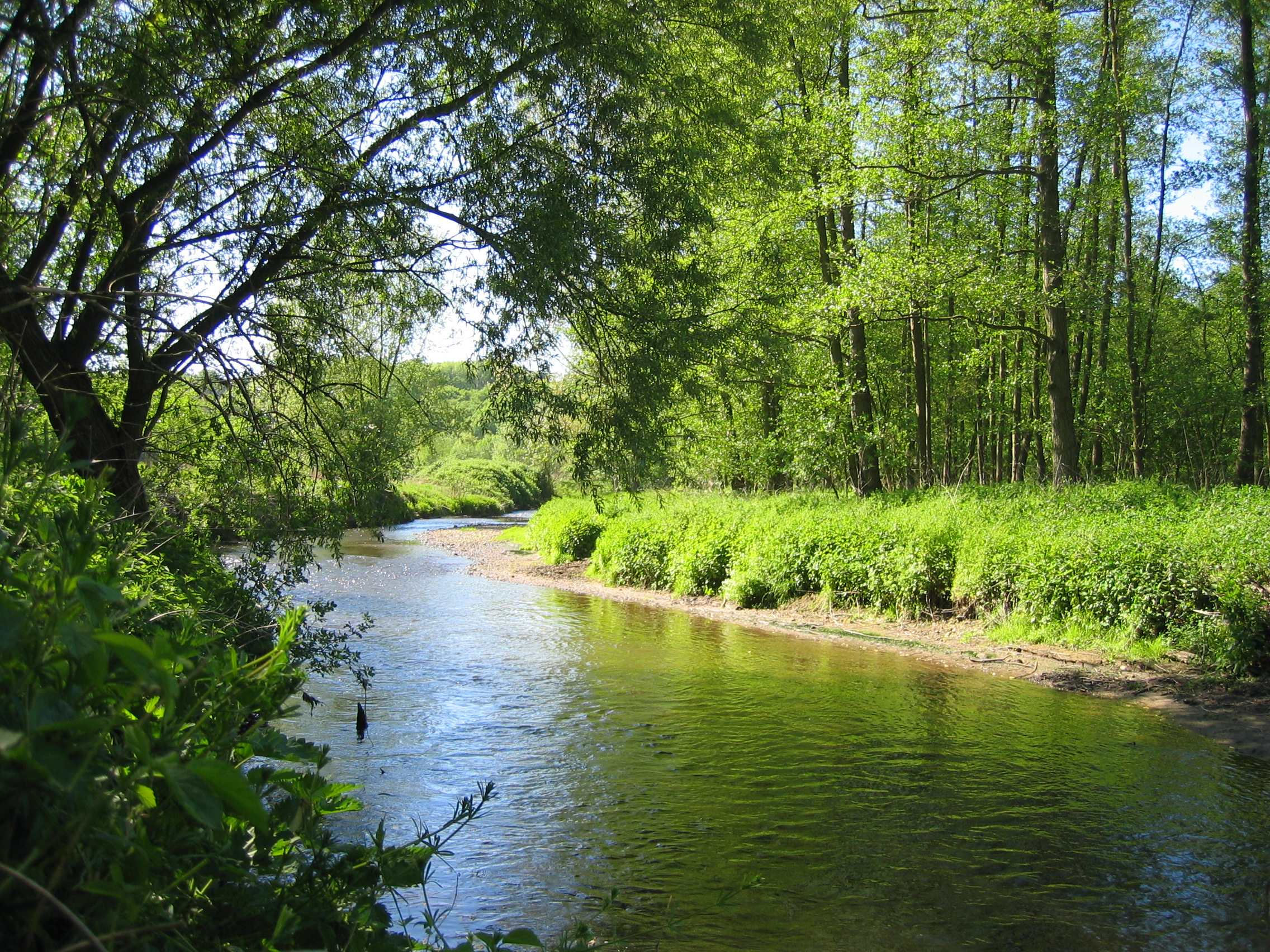 Die Wurm